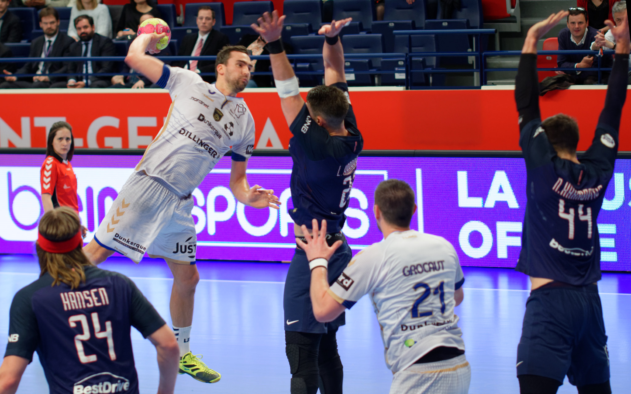 Rencontre de LidlStarligue entre le PSG et l'S Dunkerque. A Coubertin, le 08 mars 2017.